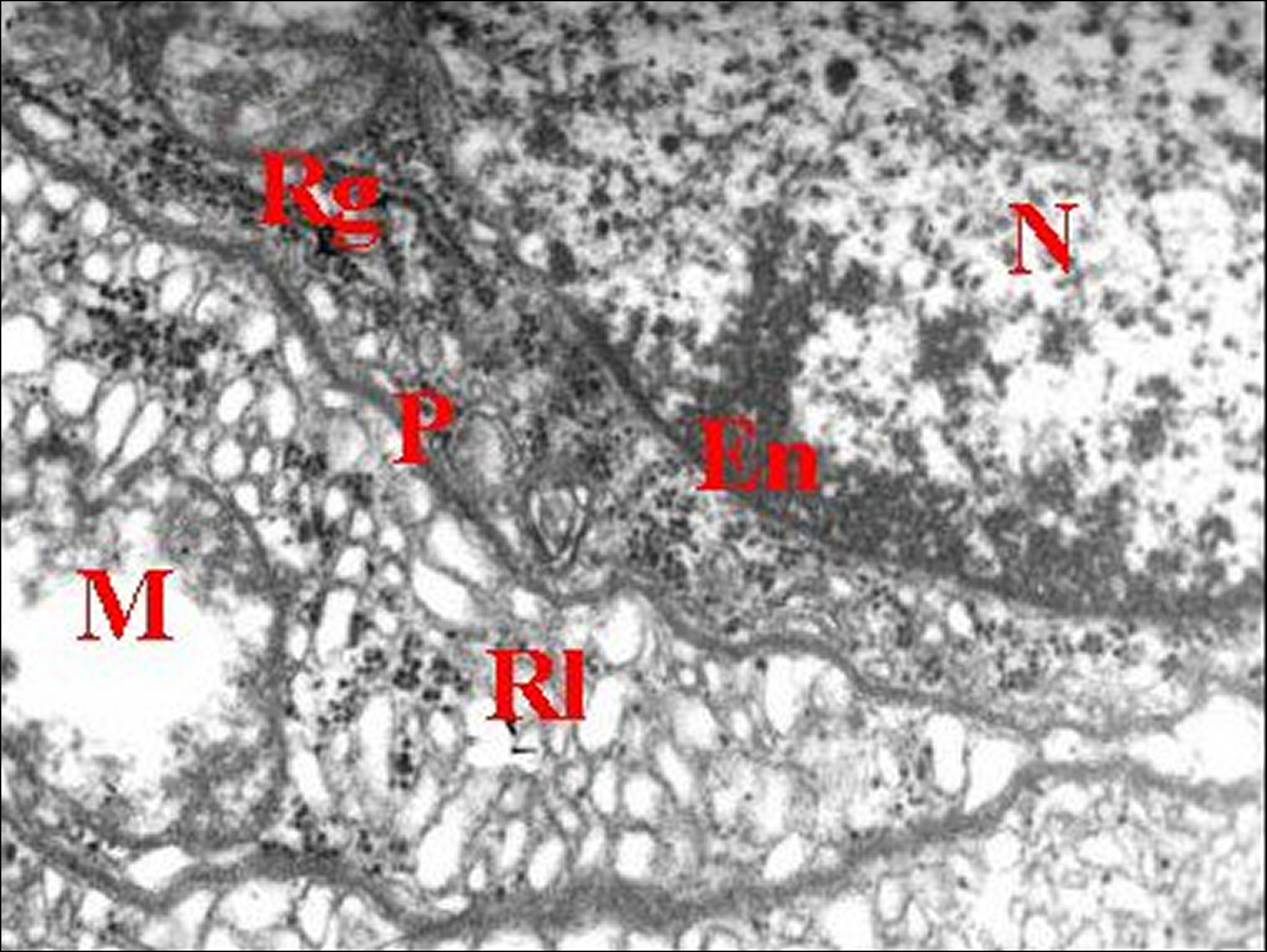 Epithelium de la glande rostrale d' Argyrodes. Organites. Microscopie electronique à transmission